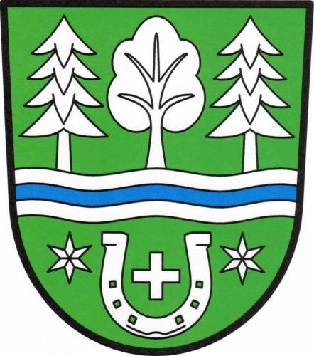 Zdobnice, znak obce